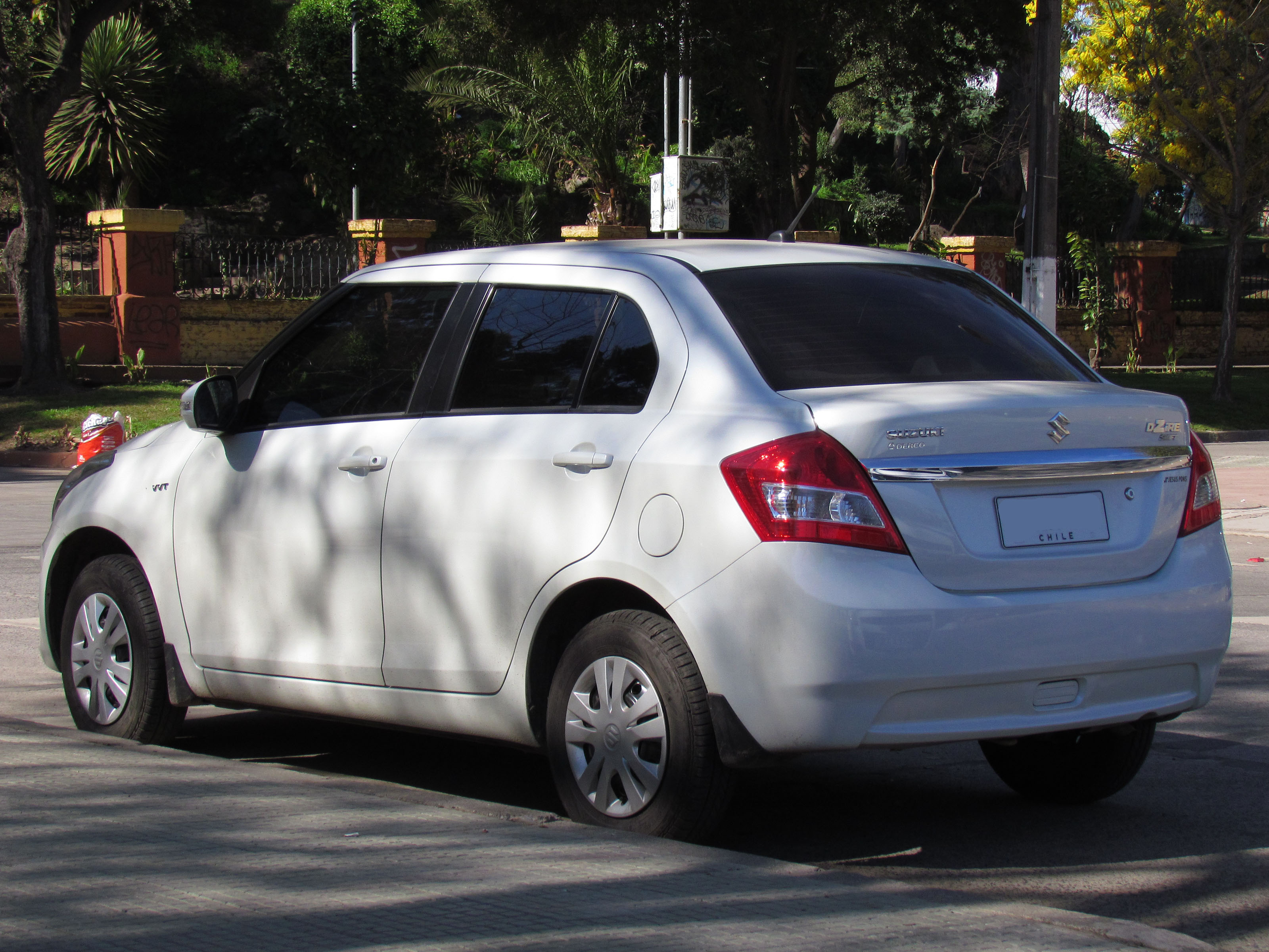 Suzuki Swift DZire 1.2 GL 2013